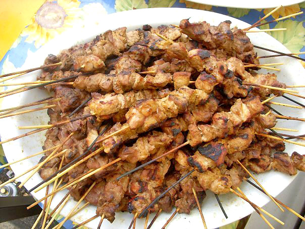 Fiera dell'Artigianato: Fortezza Firenze: PALADAR: spiedini greci e orientali - spiedini appena grigliati erano serviti con pane arabo, salse, insalata e spezie.